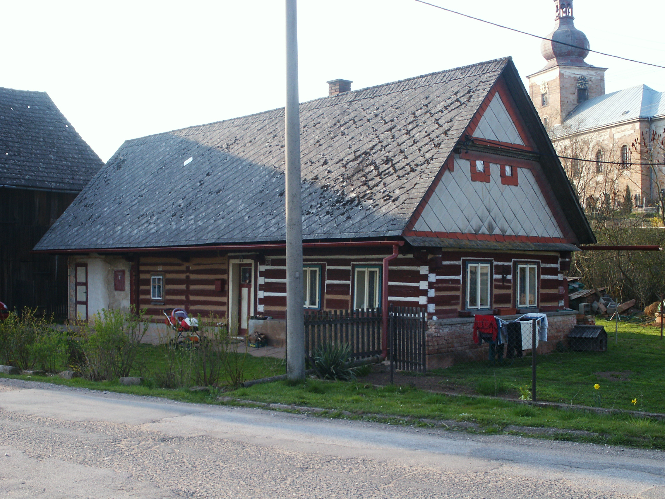 Úlibice - č.p.39; v pozadí kostel Zvěstování P. Marie